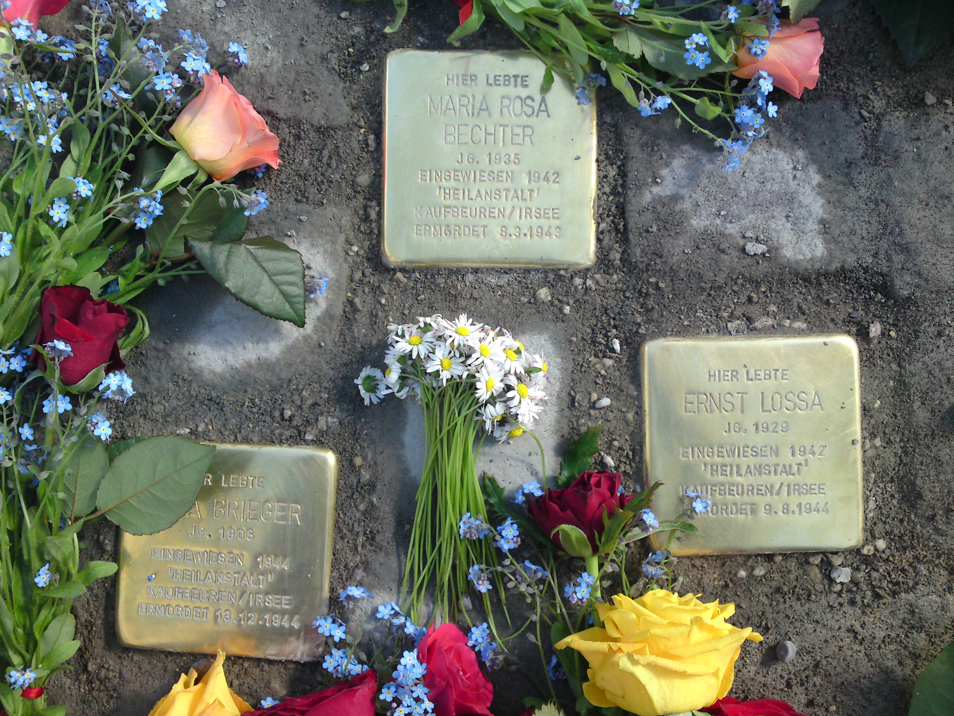 Vor dem Kloster Irsee wurden am 16. Mai 2009 drei Stolpersteine gesetzt für drei Patienten, die dort während der NS-Zeit der NS-Euthanasie zum Opfer fielen.